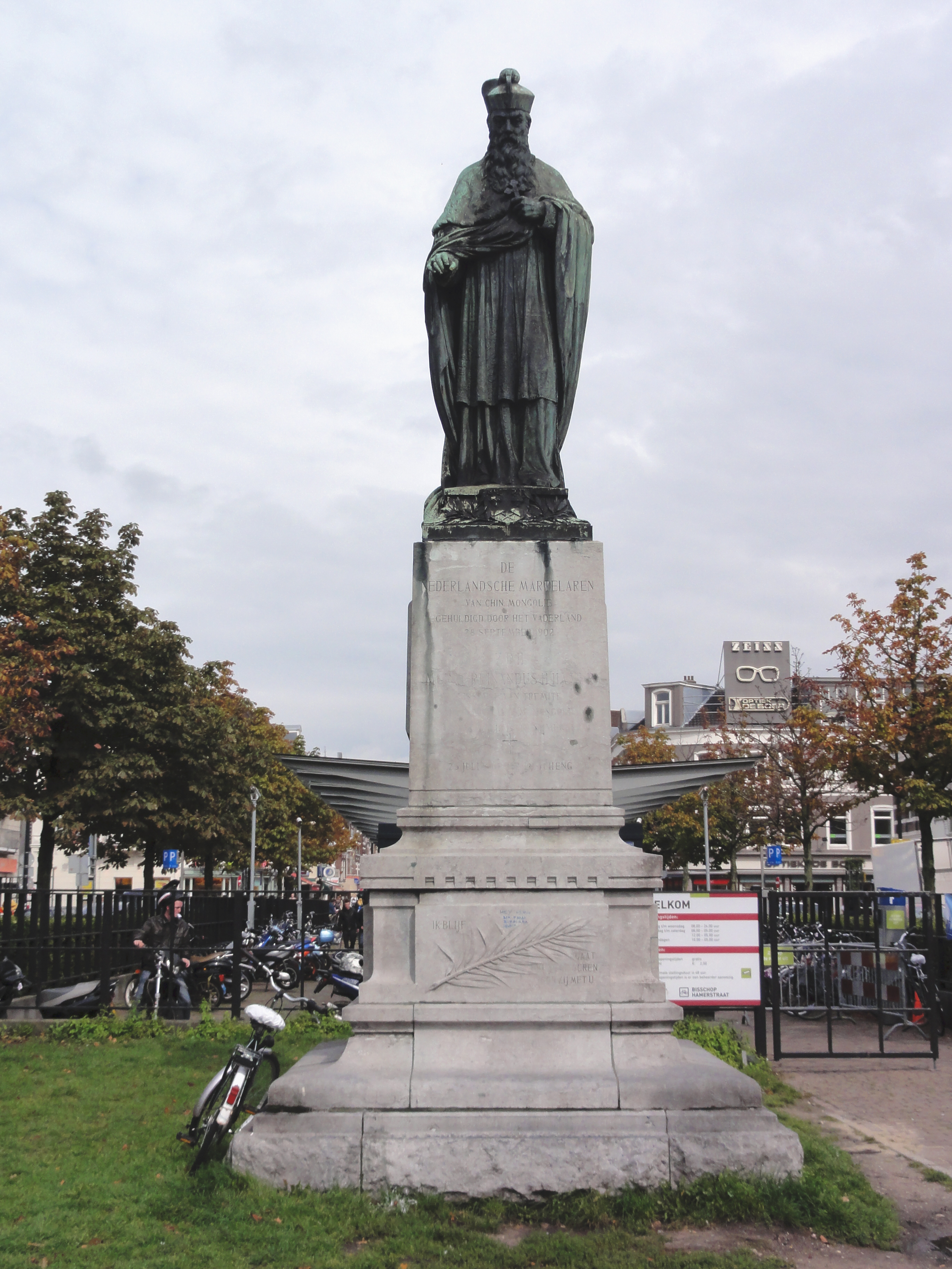 Nijmegen Rijksmonument 523066 standbeeld Mgr. Hamer 45″ N, 5° 51′ 33.01″ E Object location51° 50′ 33.66″ N, 5° 51′ 36.49″ E